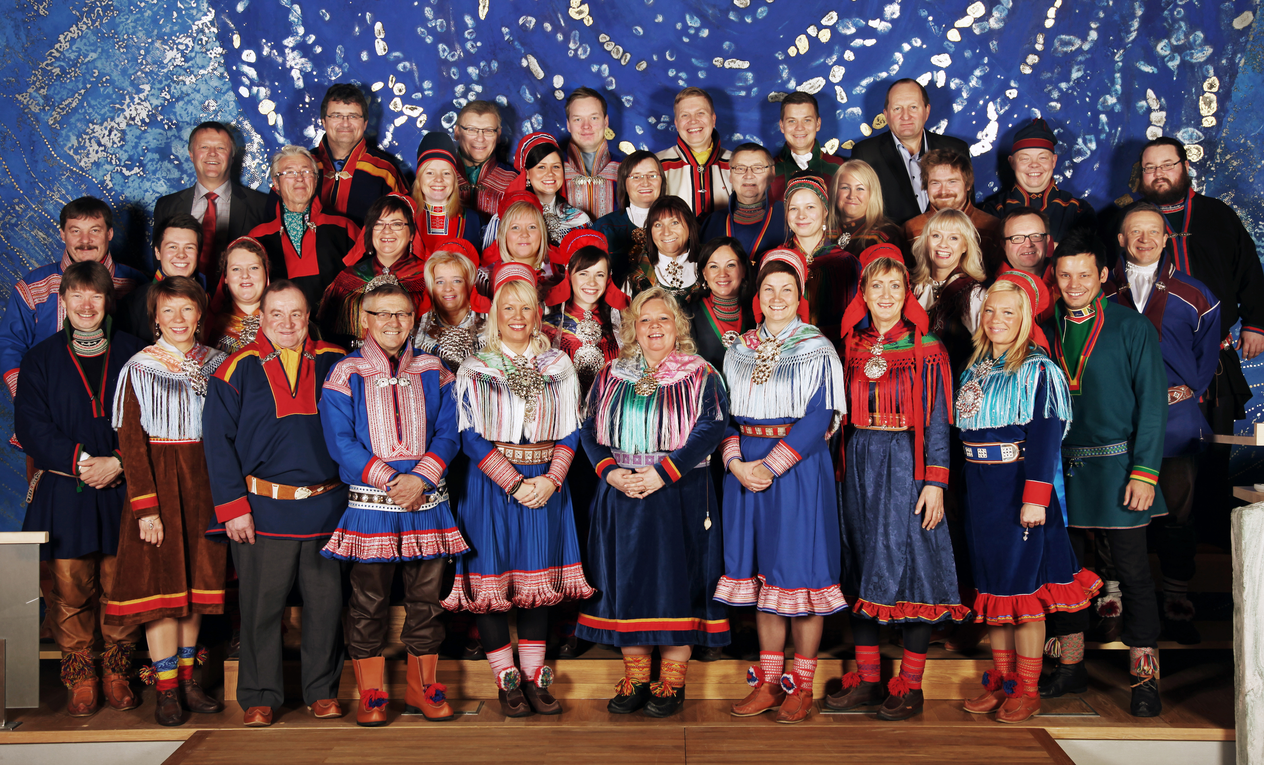 Sametingets representanter for valgperioden 2013-2017. Foto: Kenneth Hætta.